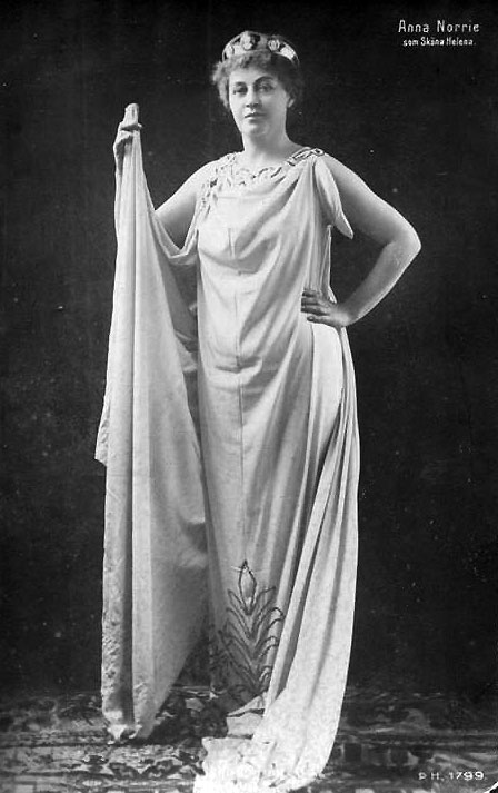 Anna Norrie i Sköna Helena